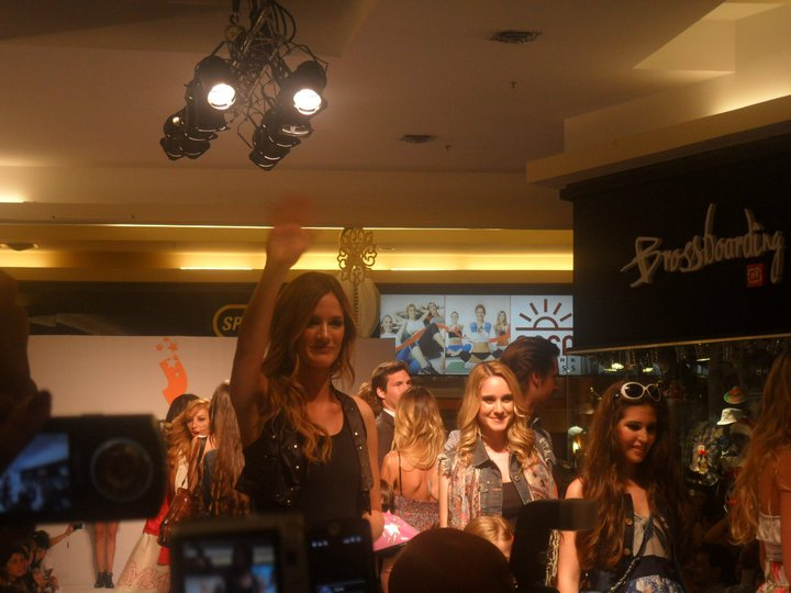 Paula desfilando